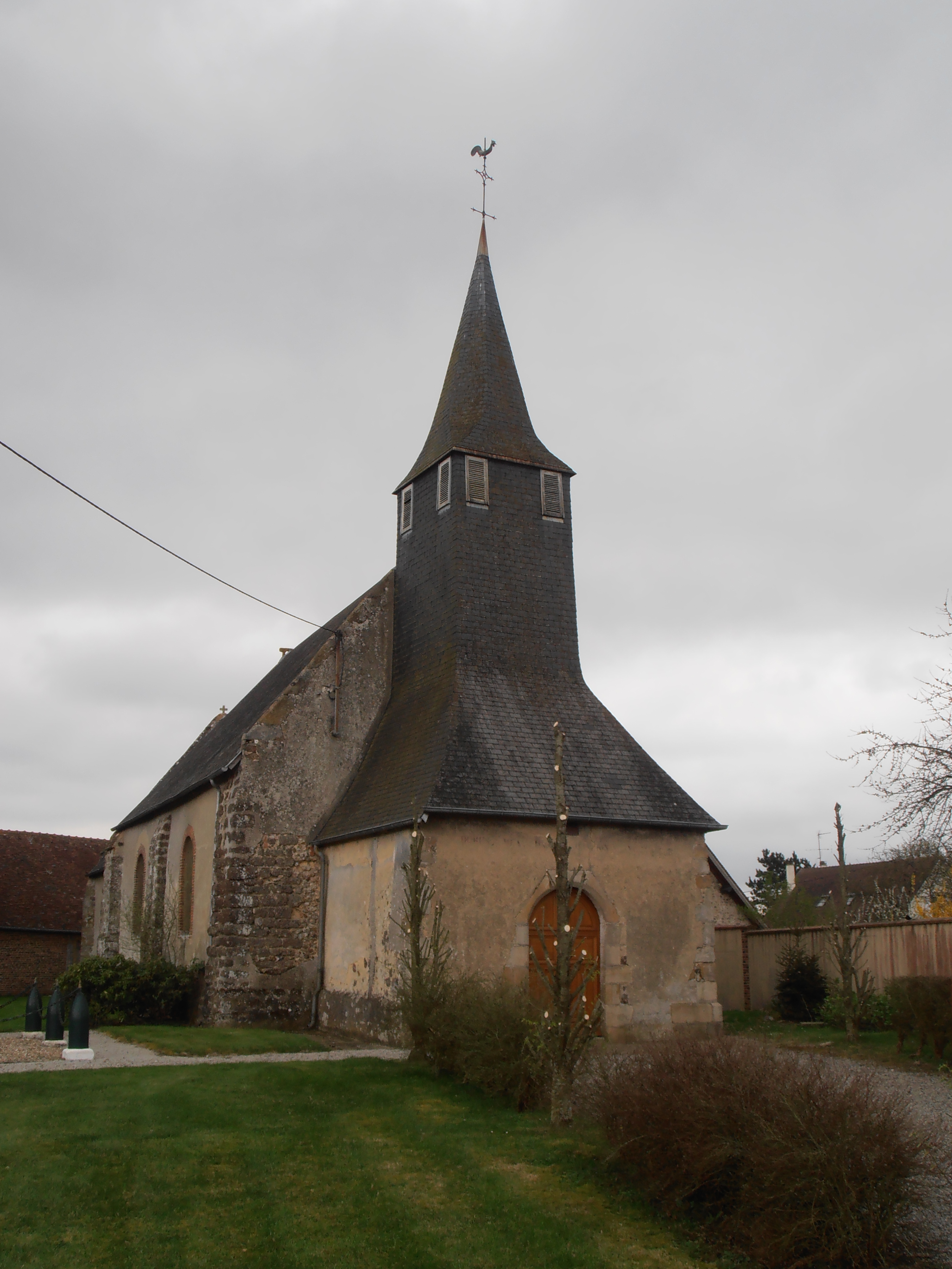 Orne, Eglise Saint-Michel-Tuboeuf